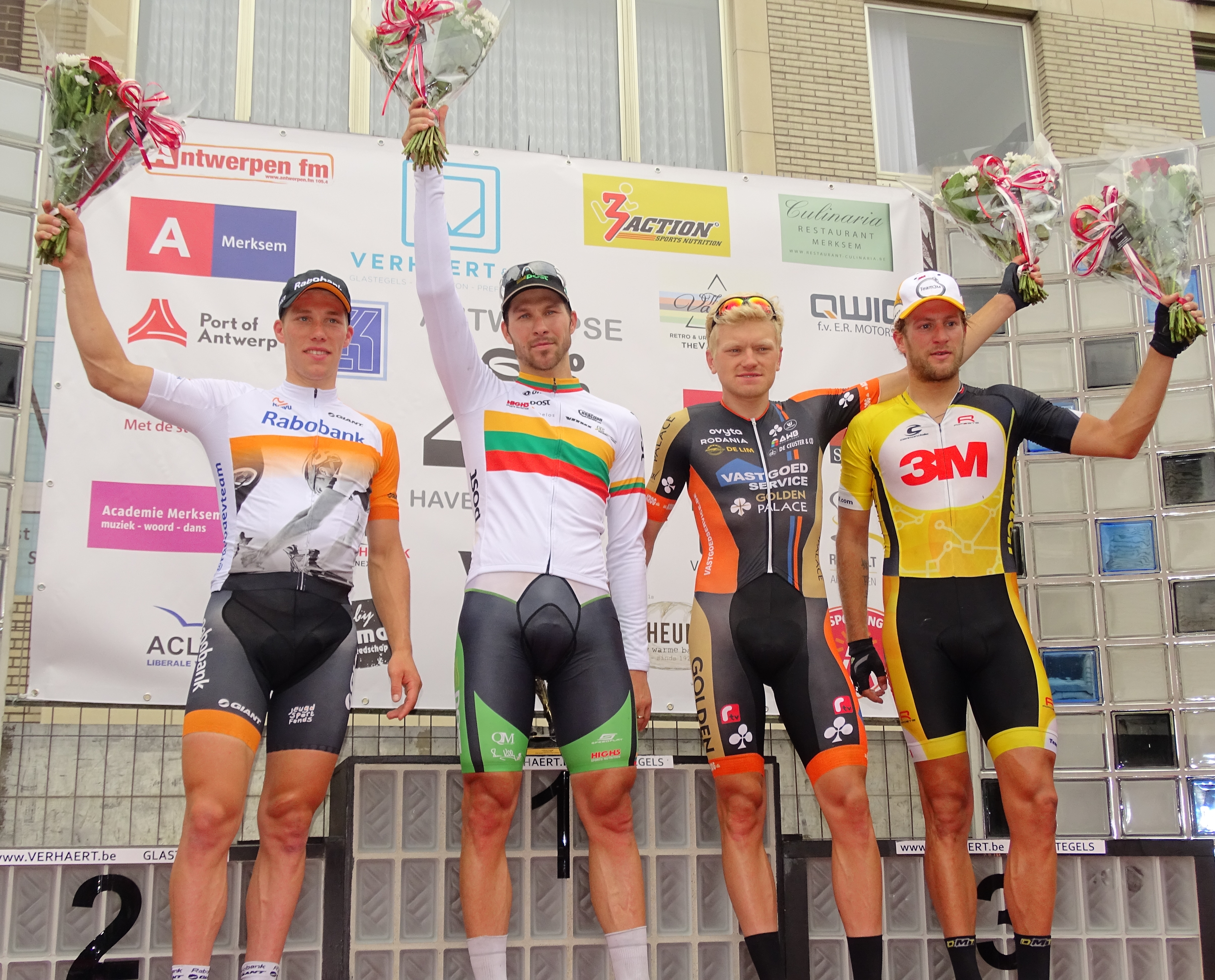 Reportage réalisé le dimanche 9 août à l'occasion de l'arrivée de la Flèche du port d'Anvers 2015 à Merksem (Anvers), Belgique.